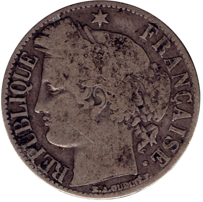 Avers 1 franc type Cérès émise en 1871